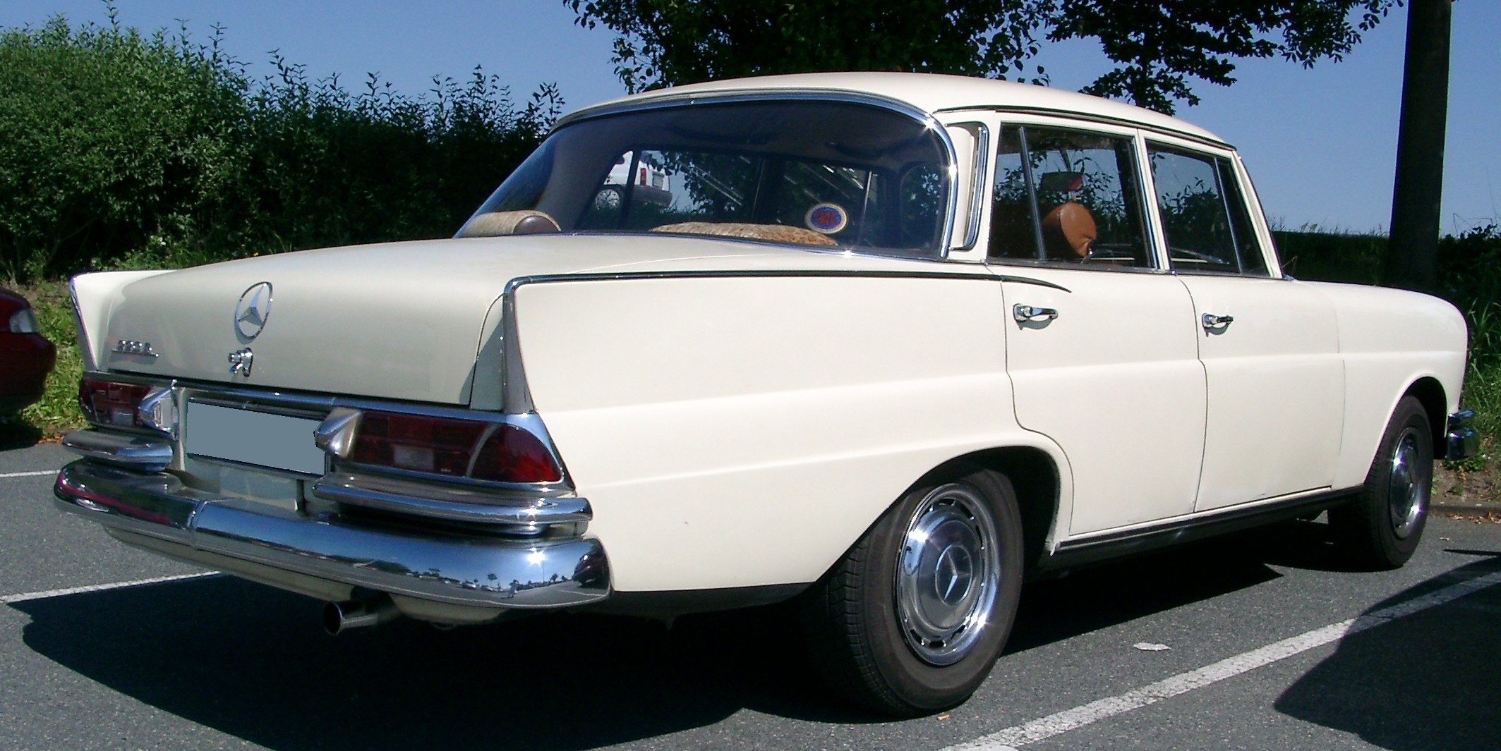 Mercedes-Benz W111